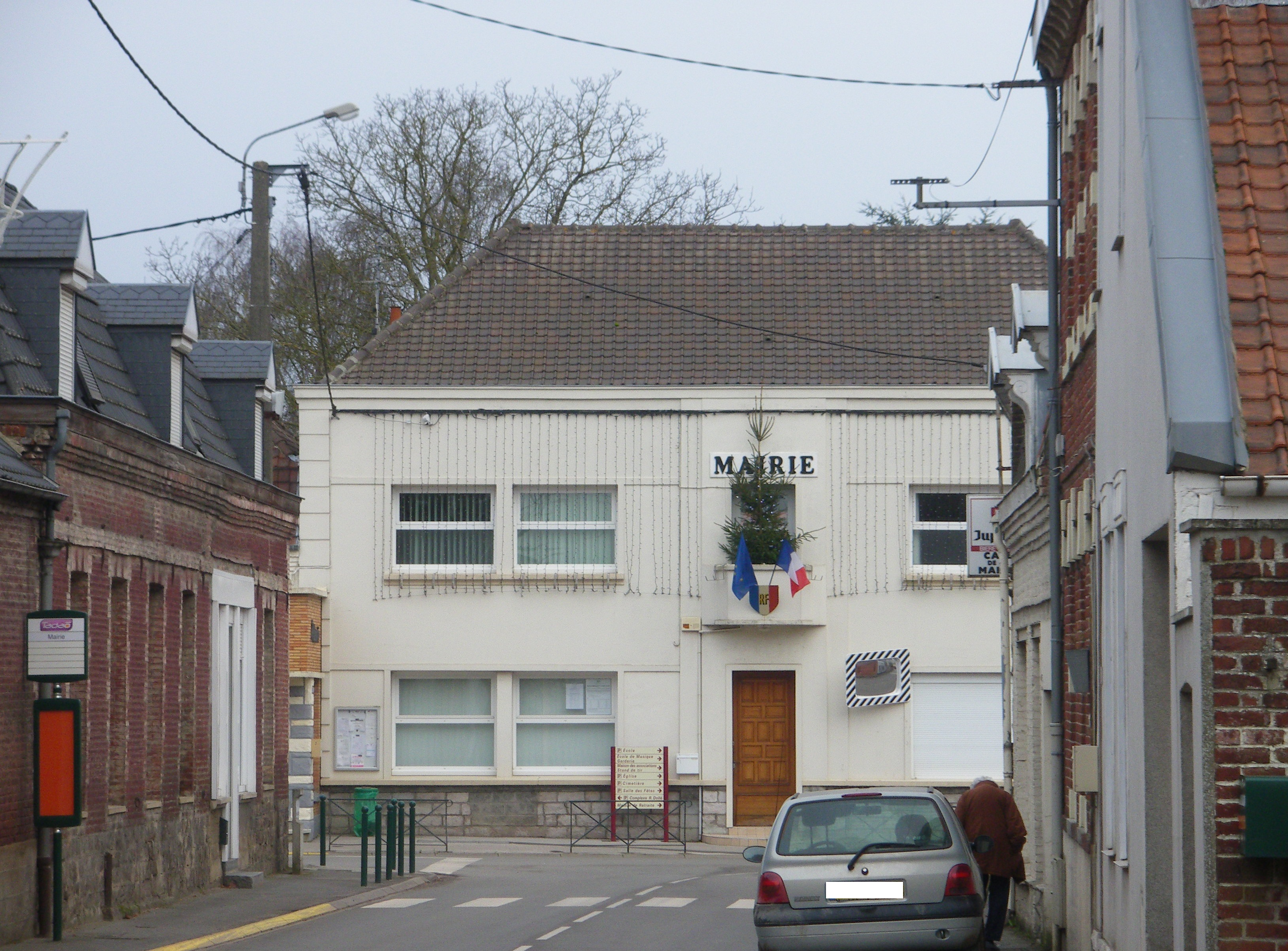 Vue de la mairie de Verquin.